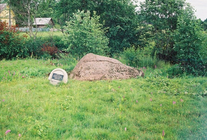 Крэва. Крэўскі вялікі камень